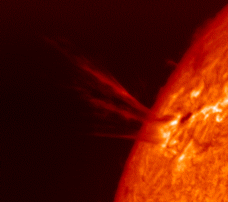 Internal Corona Solar eject